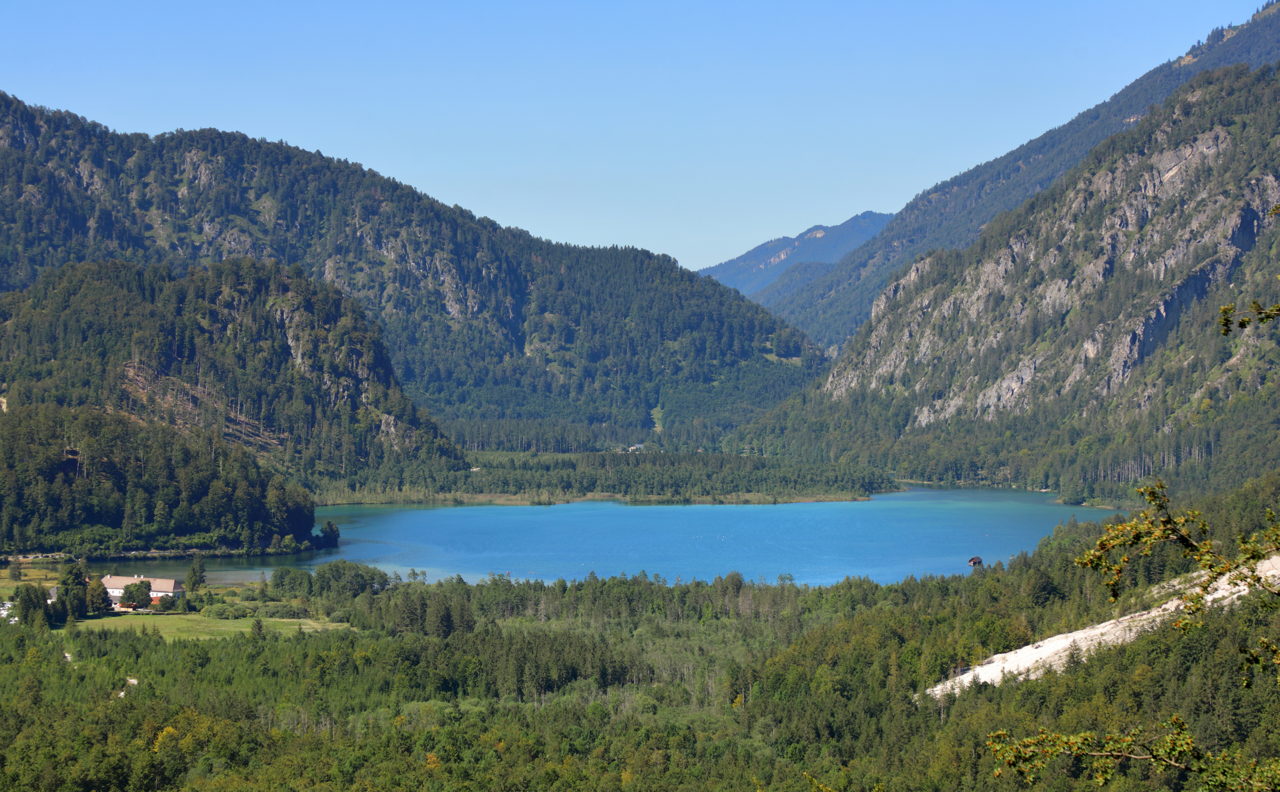 Südansicht des Almsees in der oberösterreichischen Gemeinde Grünau im Almtal. Der See befindet sich am Nordrand des Toten Gebirges, ist 2,3 km lang und 700 m breit. Er ist die Quelle der Alm, die in die Traun, ein Nebenfluss der Donau, fließt.